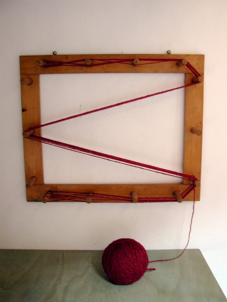 foto mia personale, orditoio da parete a pioli, 2007 Licensing Categoria:Immagini sulla tessitura